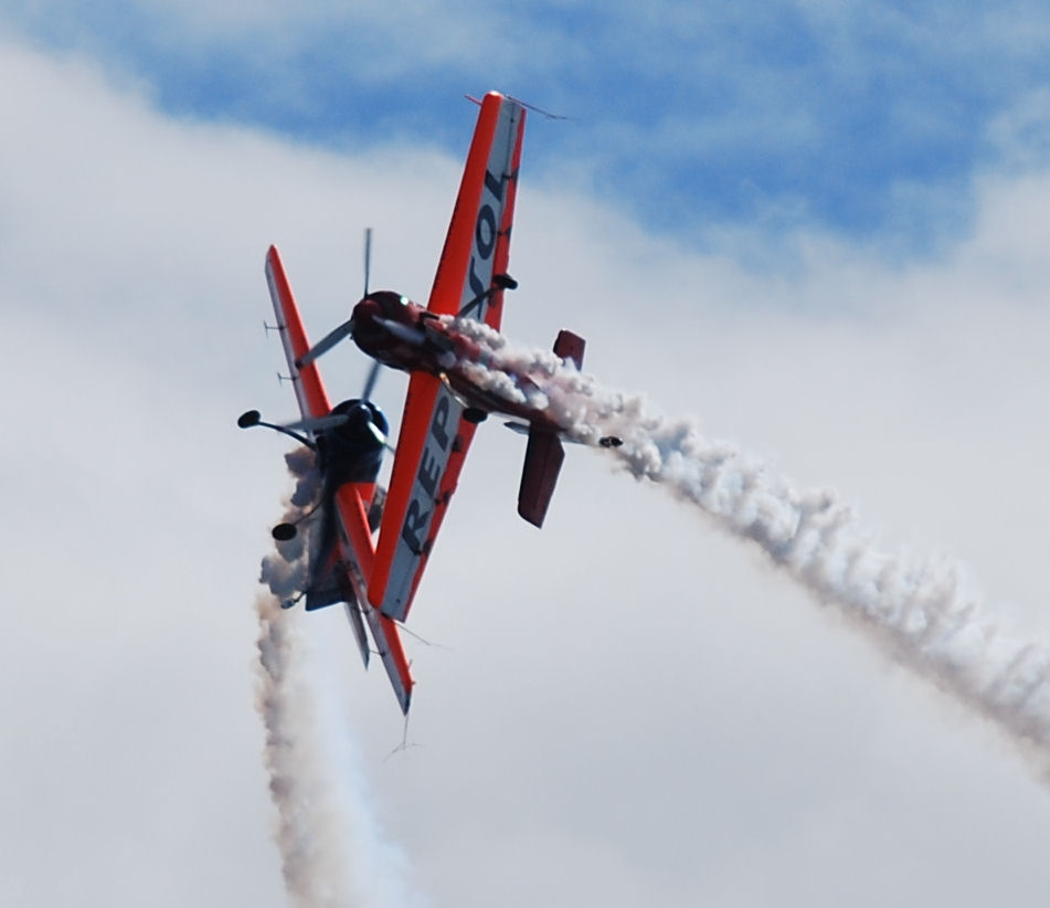 Creuament de l'equip Bravo 3